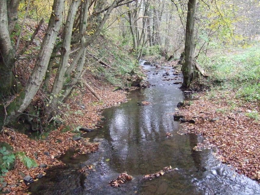 Feller Bach im Grundtal